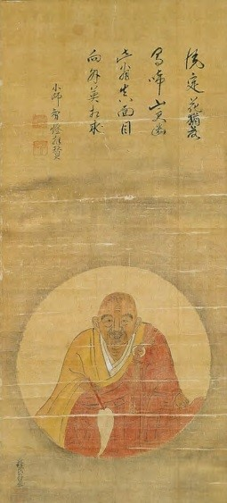 月舟宗胡の頂相。